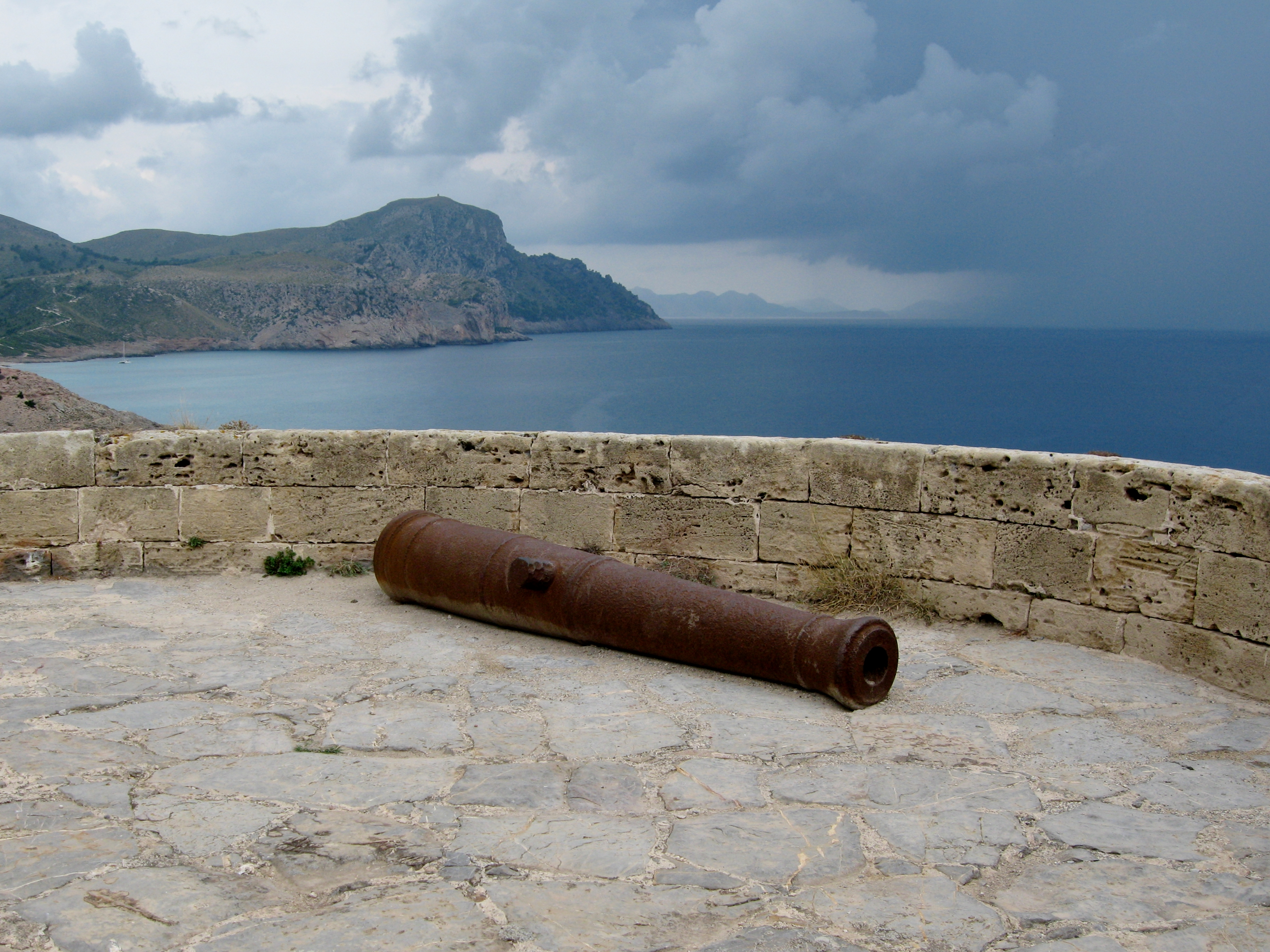 Kanone auf dem Torre des Matzoc (auch Torre d’Aubarca), Gemeinde Artà, Mallorca, Spanien